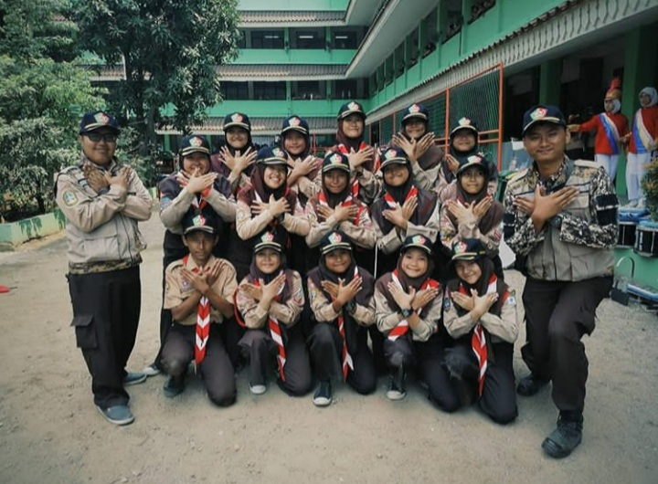 Pramuka 05